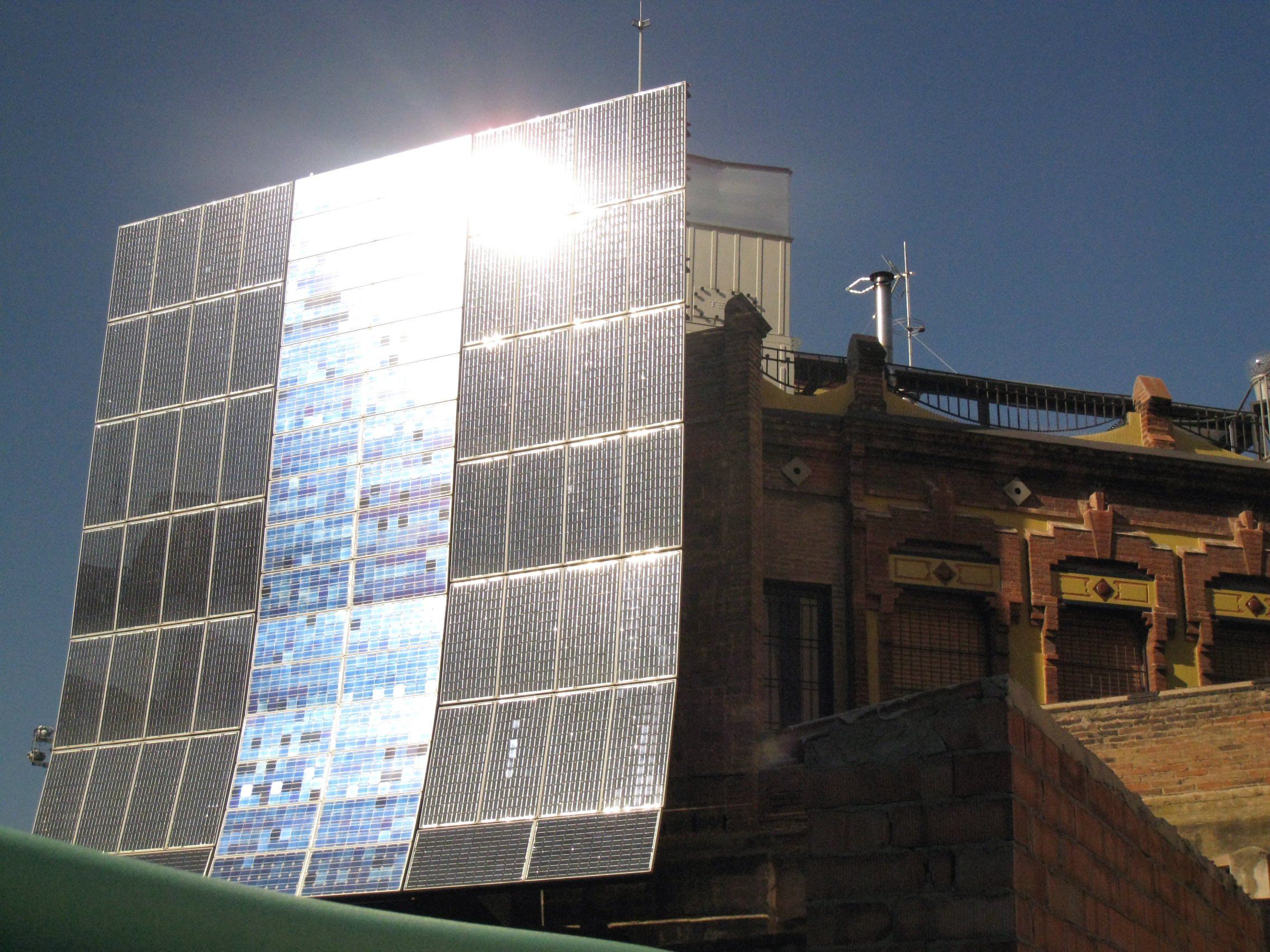 Edifici d'accés a la Catalana de Gas, de Josep Domènech i Estapà (1907), al barri de la Barceloneta (Barcelona). Placa solar a la façana del passeig de Salvat Papasseit.